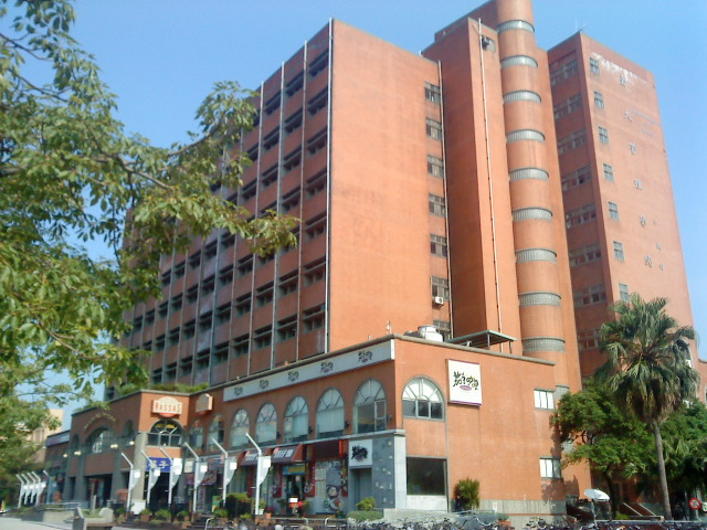 國立臺灣大學第二學生活動中心與管理學院二號館相連。